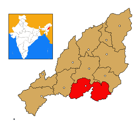 Mapa de localización del distrito